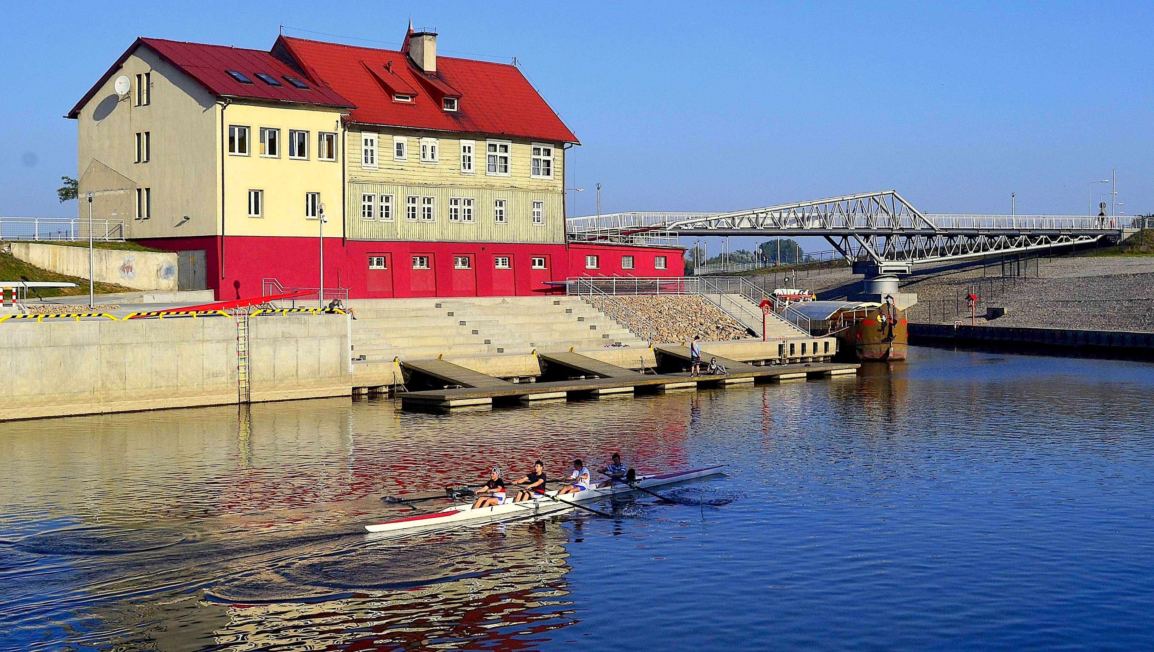 Klub Wioślarski Grudziądz